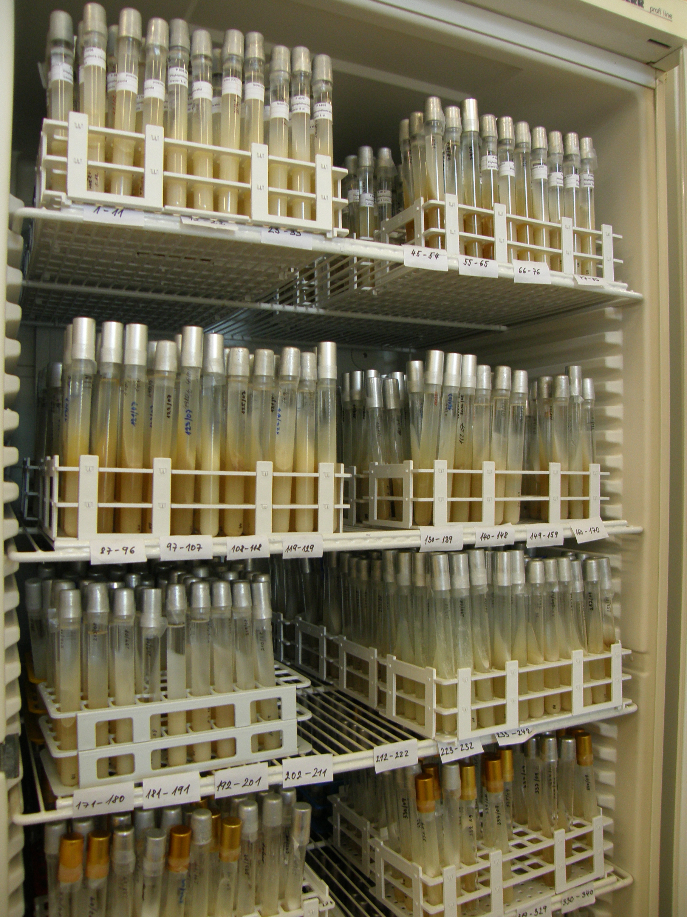 Czech Collection of Phytopathogenic Oomycetes